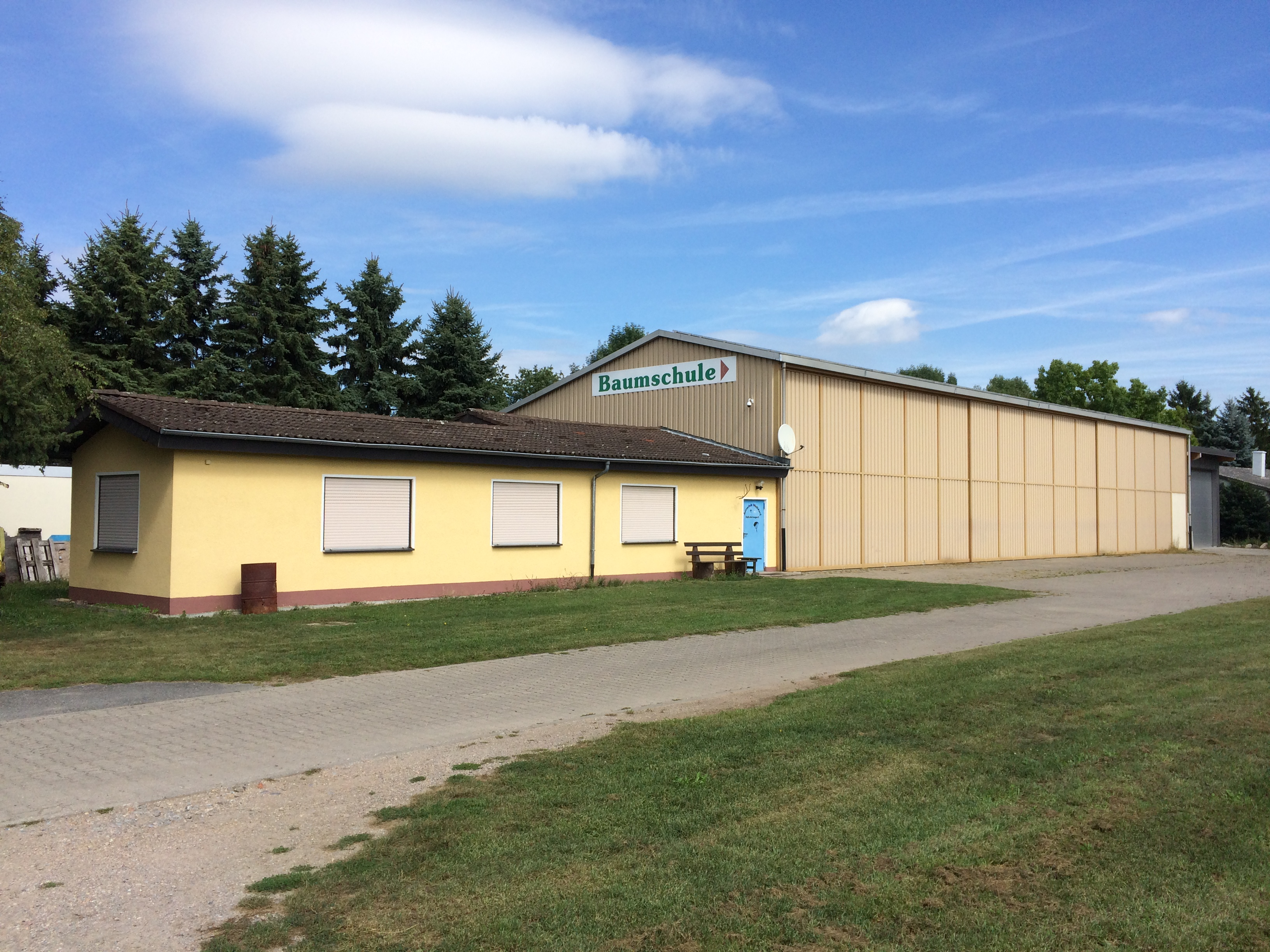 "neue" Halle mit Fallschirmspringerheim